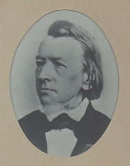 Karl Friedrich Rheinwald Vorsitzender vom Gründungskomitee bei der Handwerkerbank in Rottweil.